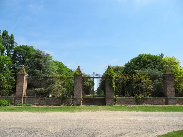 Entrée du domaine de Saint-Vincent